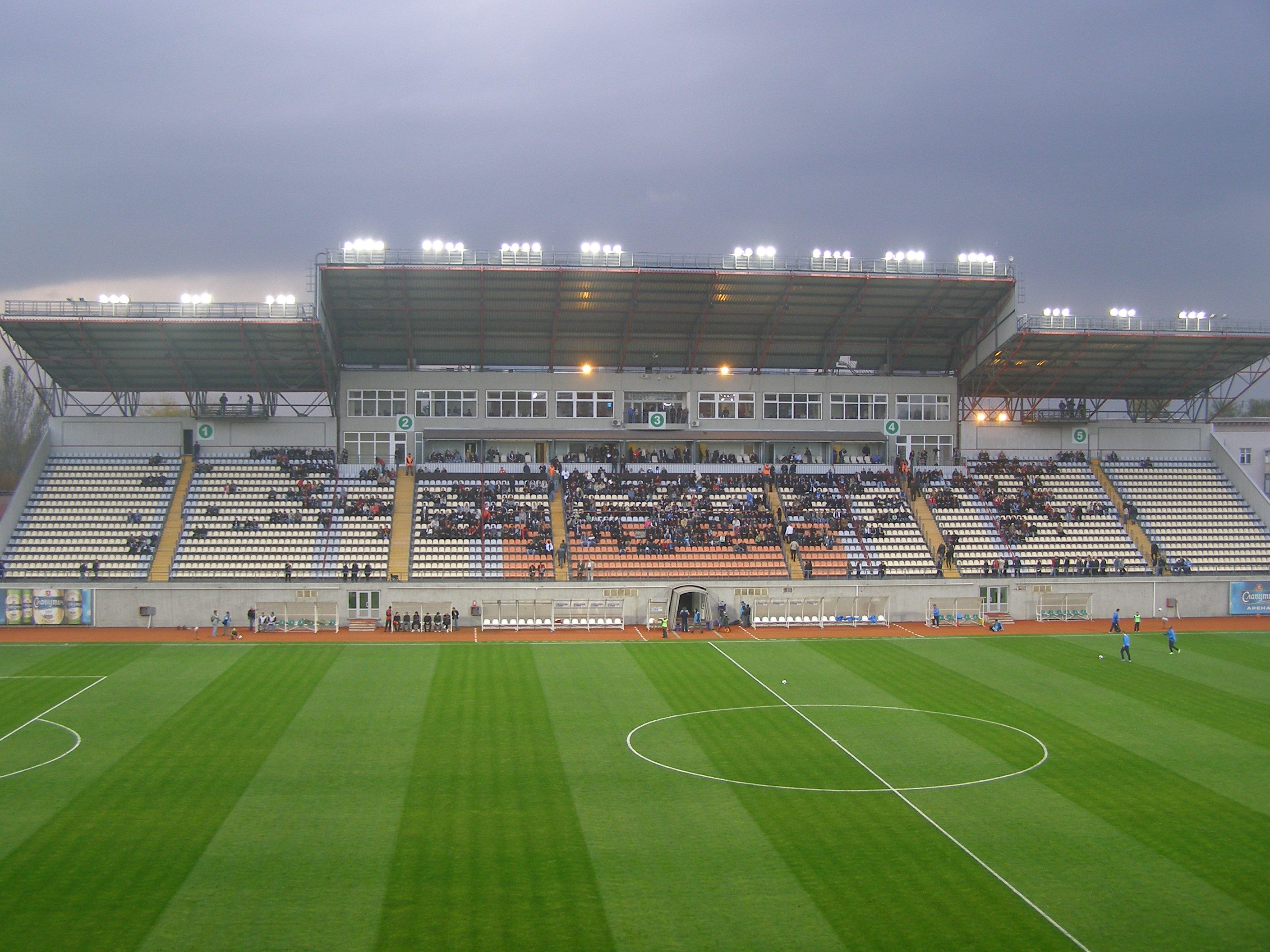 Slawutytsch-Arena Fußballstadion in Saporischschja